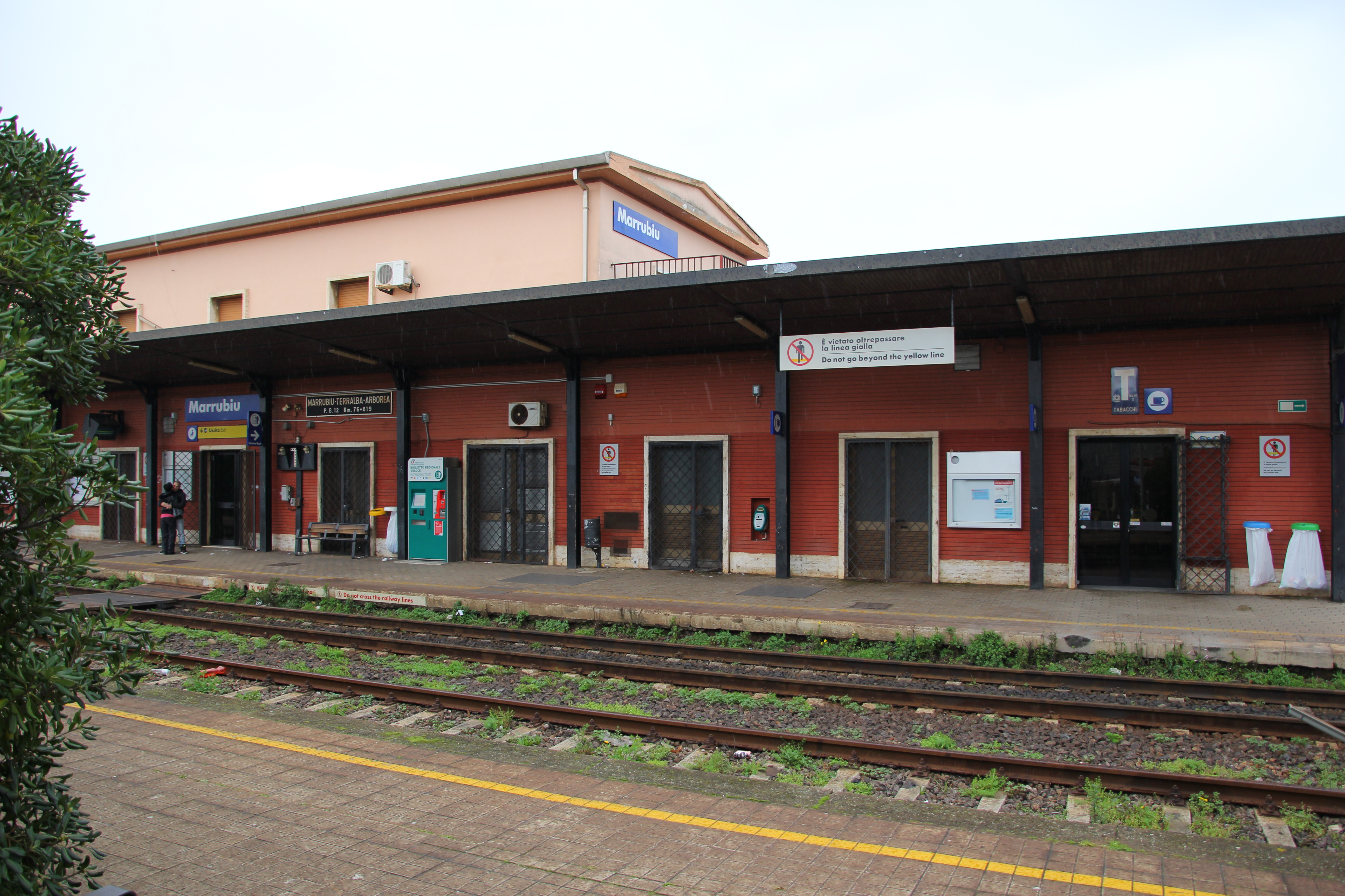 Marrubiu - Stazione ferroviaria